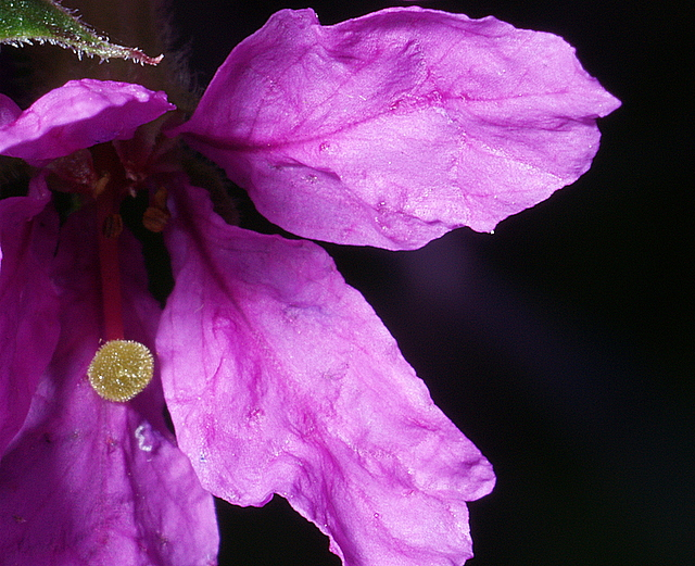 Detailaufnahme der Blüte des Blutweiderich